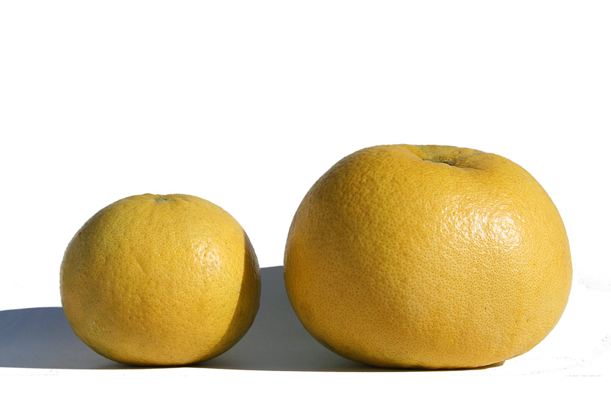 comparaison des fruits Orobranco et Melegold californiens